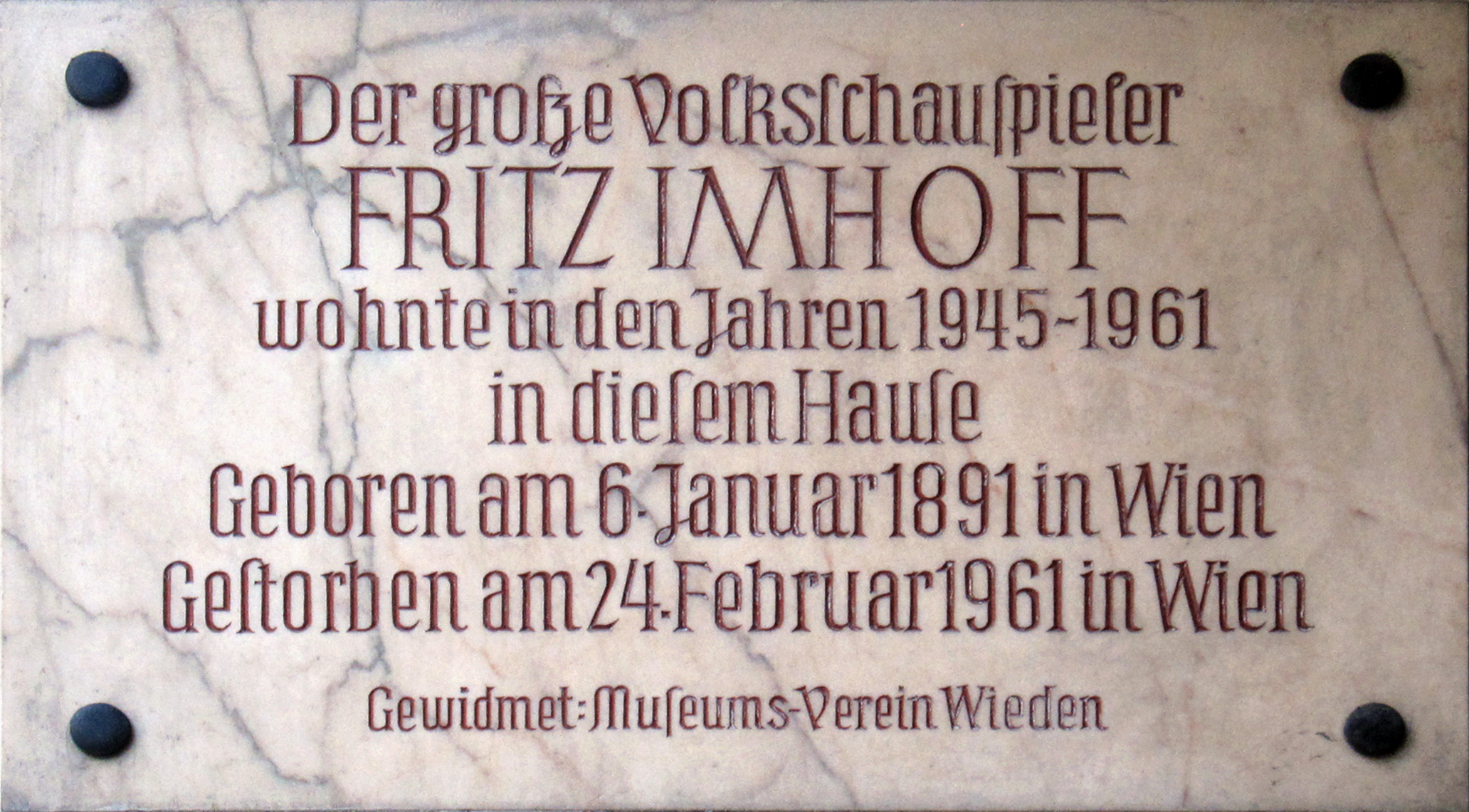 Gedenktafel für Fritz Imhoff, Habig-Hof, Wiedner Hauptstraße 15-17, Wien-Wieden